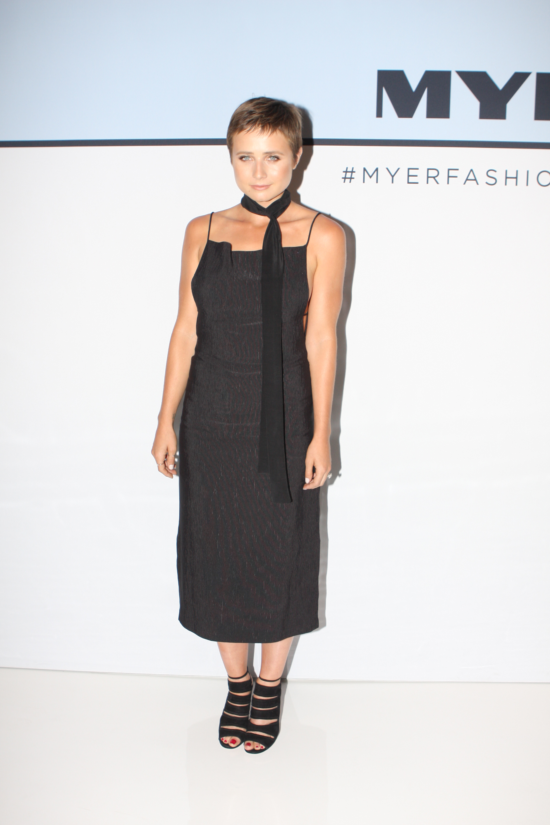 Tessa James